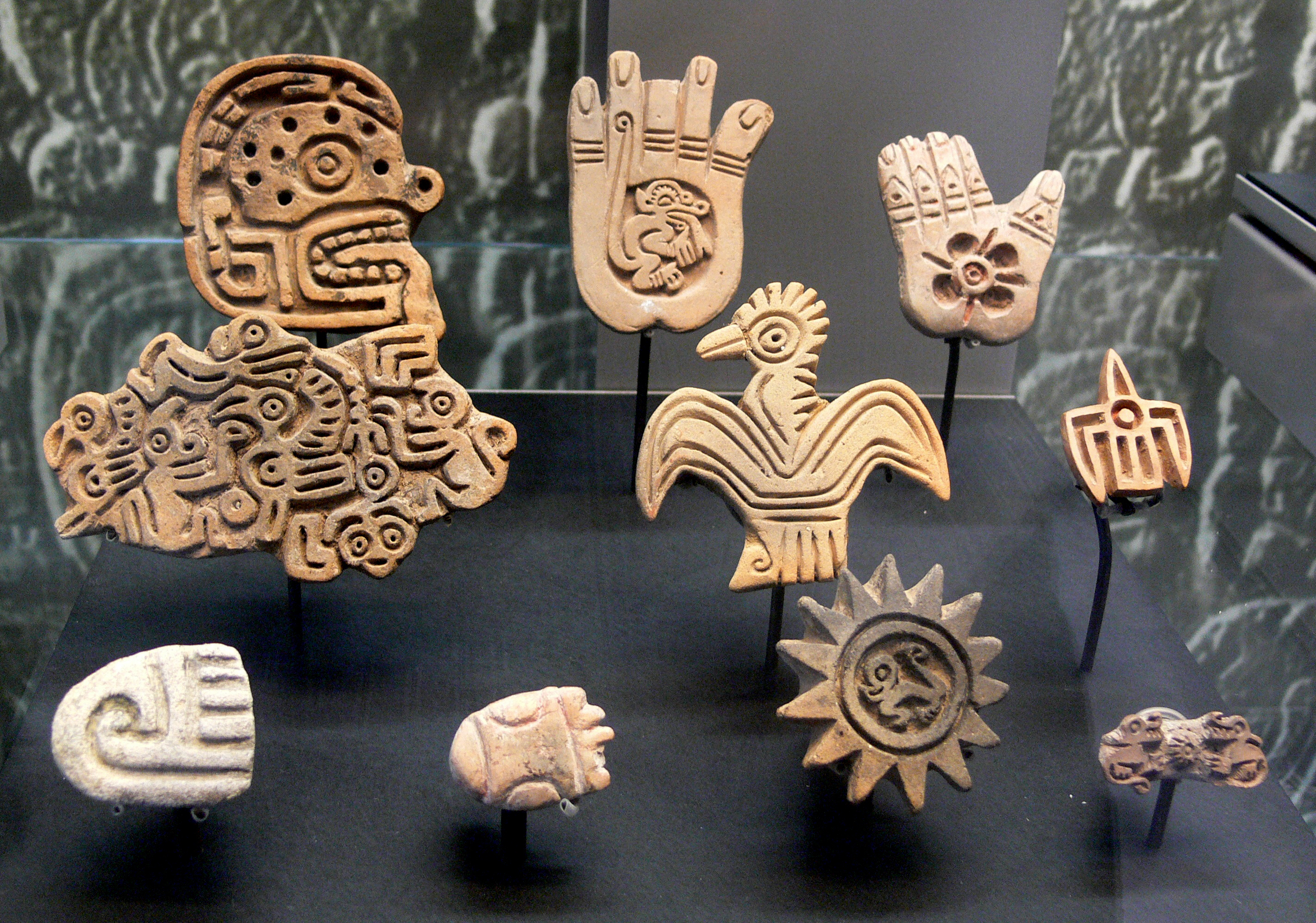 Schaffhausen, Museum zu Allerheiligen, Sammlung Ebnöther (Abteilung "Schrift") Stempel verschiedener präkolumbianischer Kulturen aus Mexiko und Ekuador